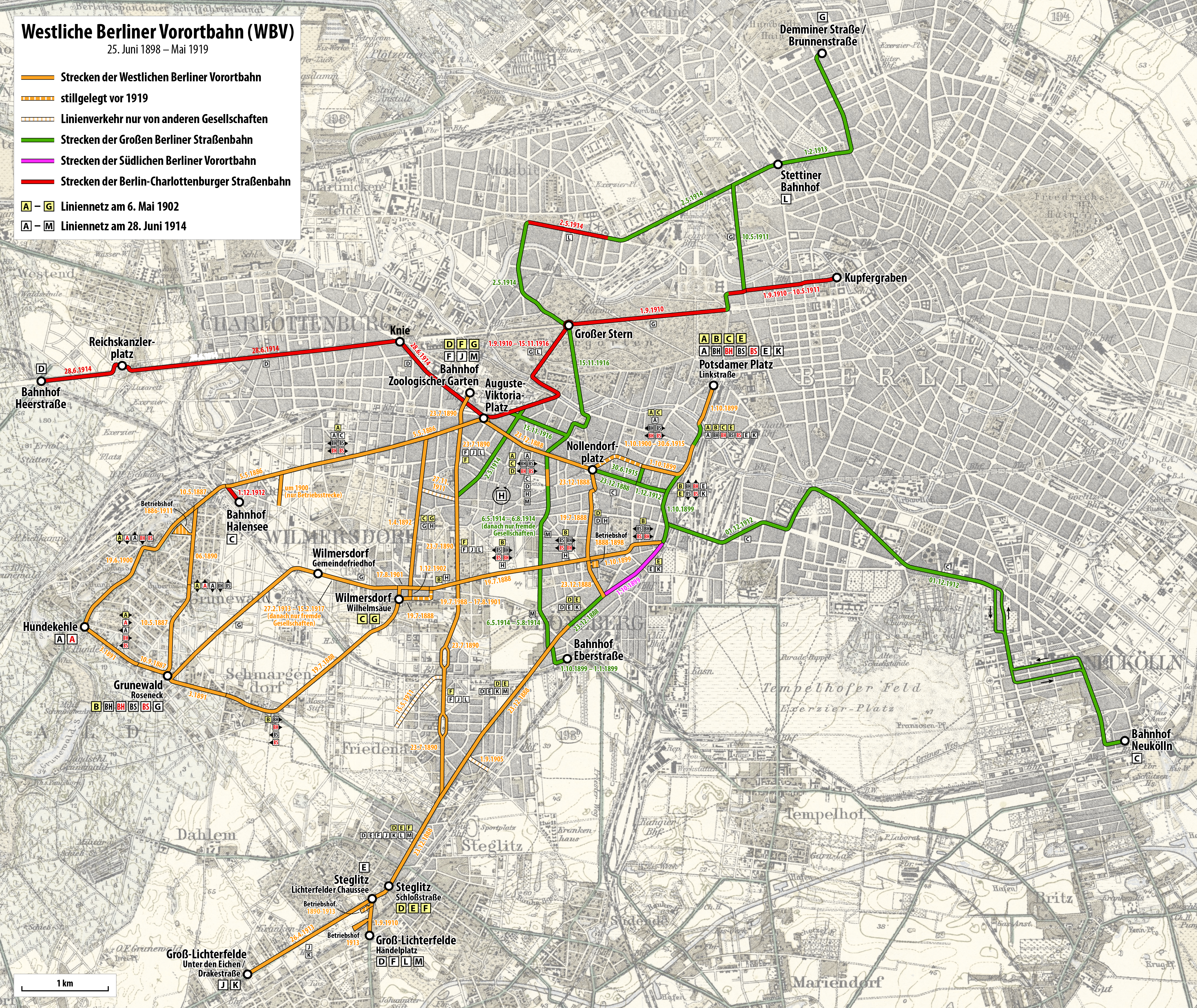 Karte der Westlichen Berliner Vorortbahn (1898-1919)